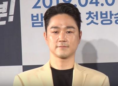 KBS 2TV 월화드라마 '국민 여러분!' 제작발표회가 1일 오후 서울 여의도 콘래드서울에서 열렸다.